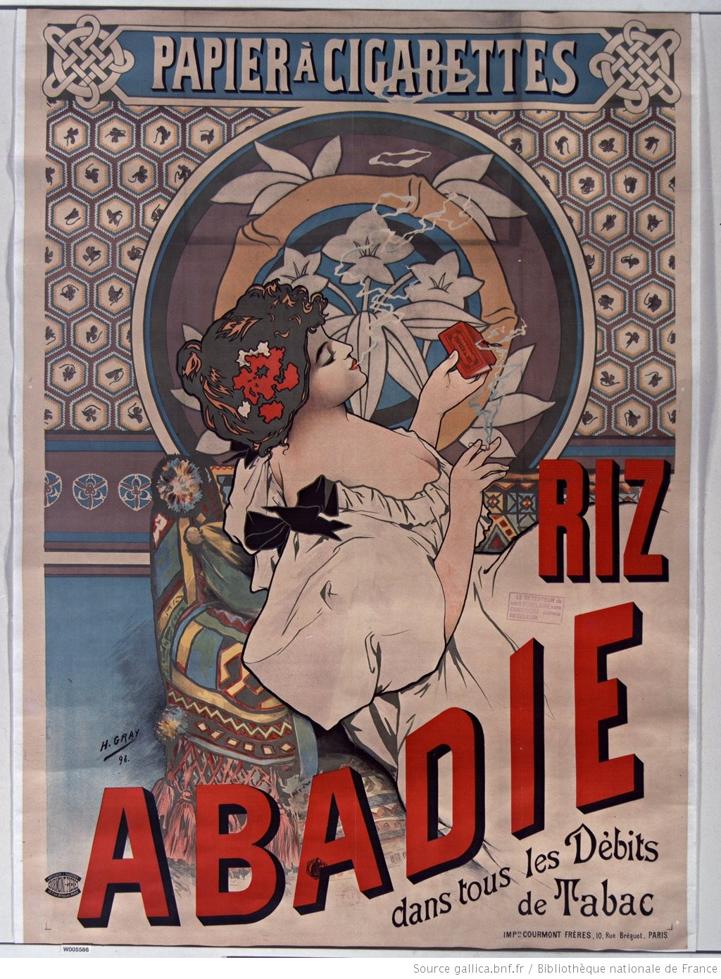 Papier à cigarette Riz Abadie : [affiche]